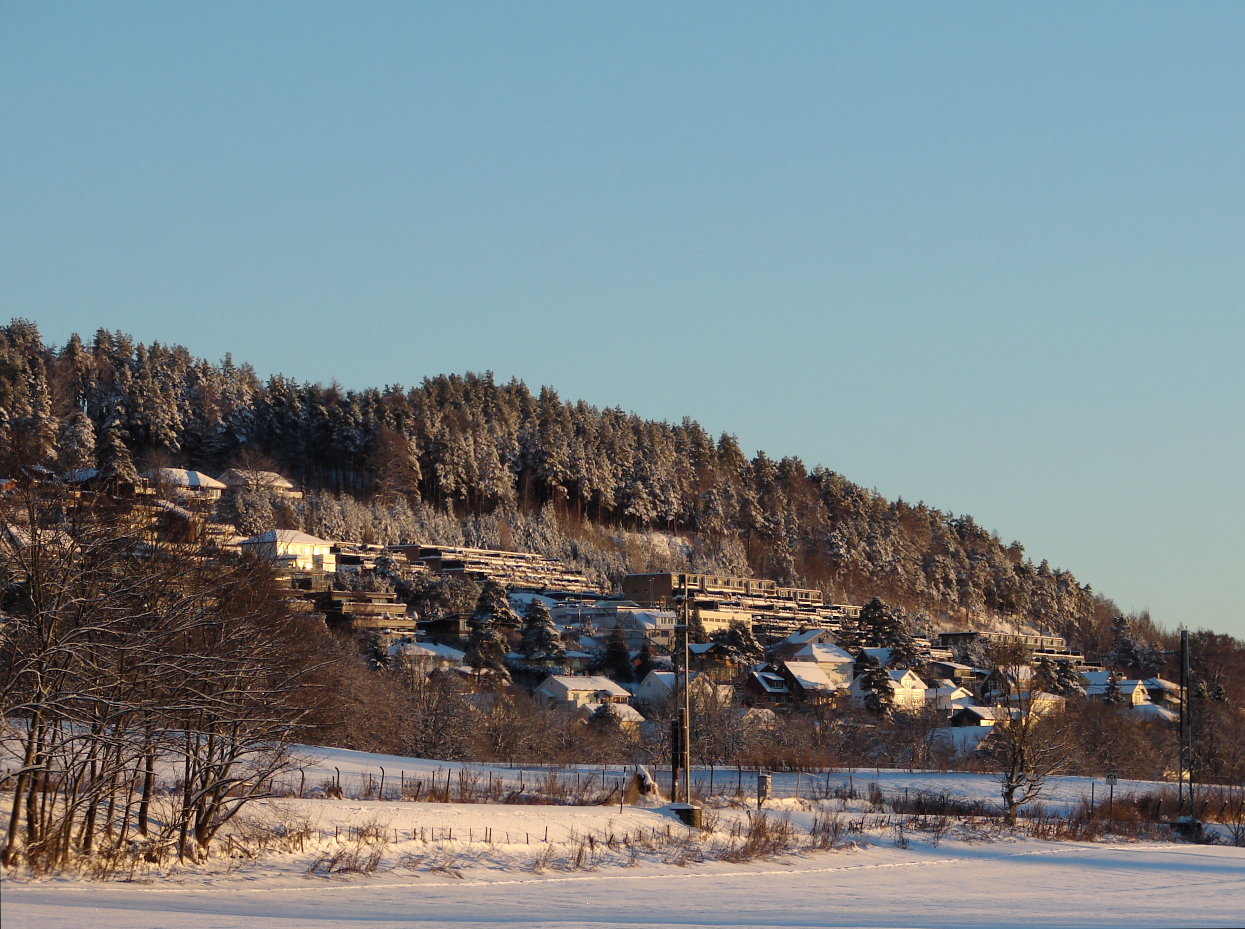 Fra Breidablikk i Porsgrunn, Grenland i Telemark